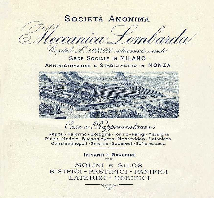 Società Anonima Meccanica Lombarda - carta intestata 1913